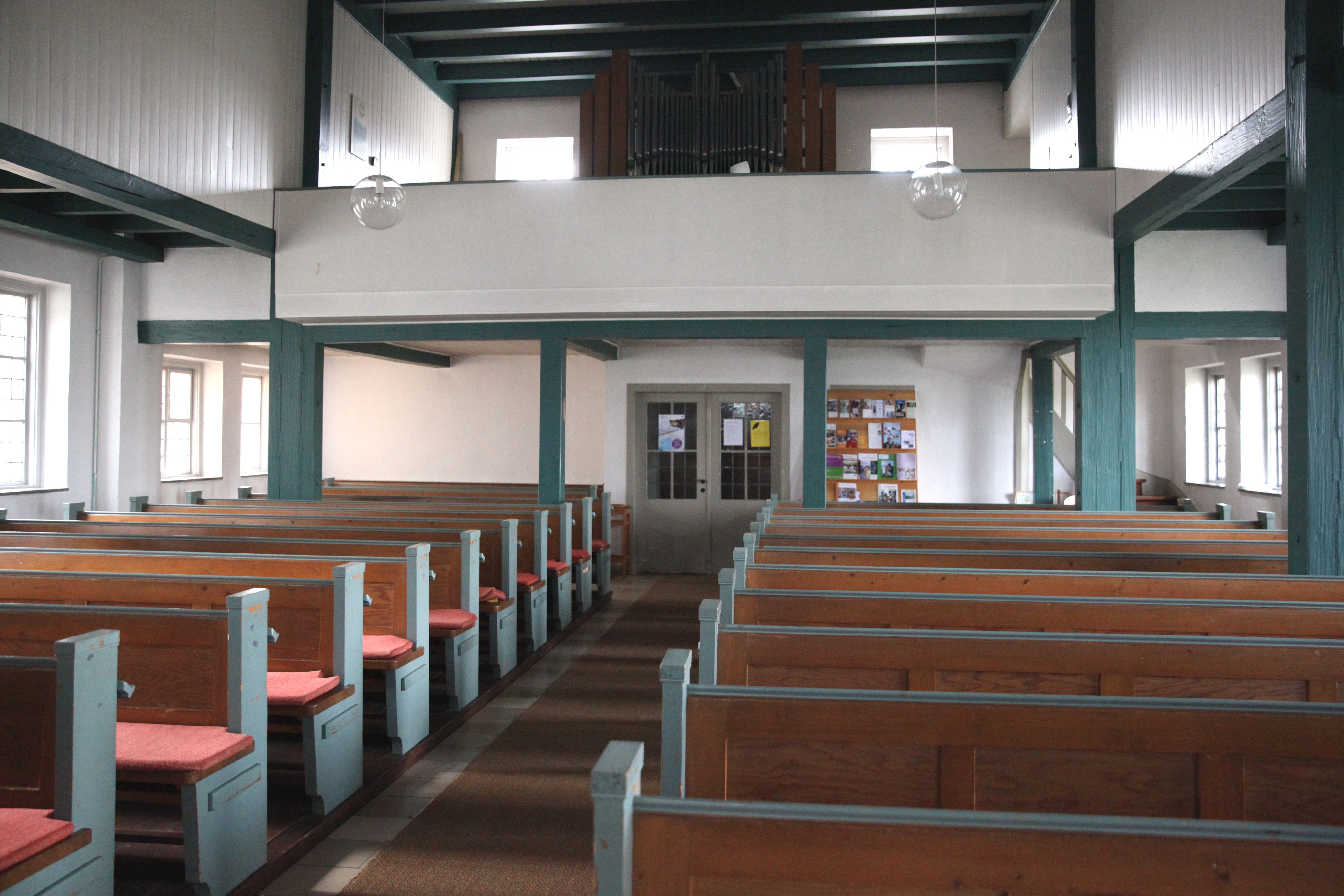 Friedenskirche, Wildenheid, Landkreis Coburg